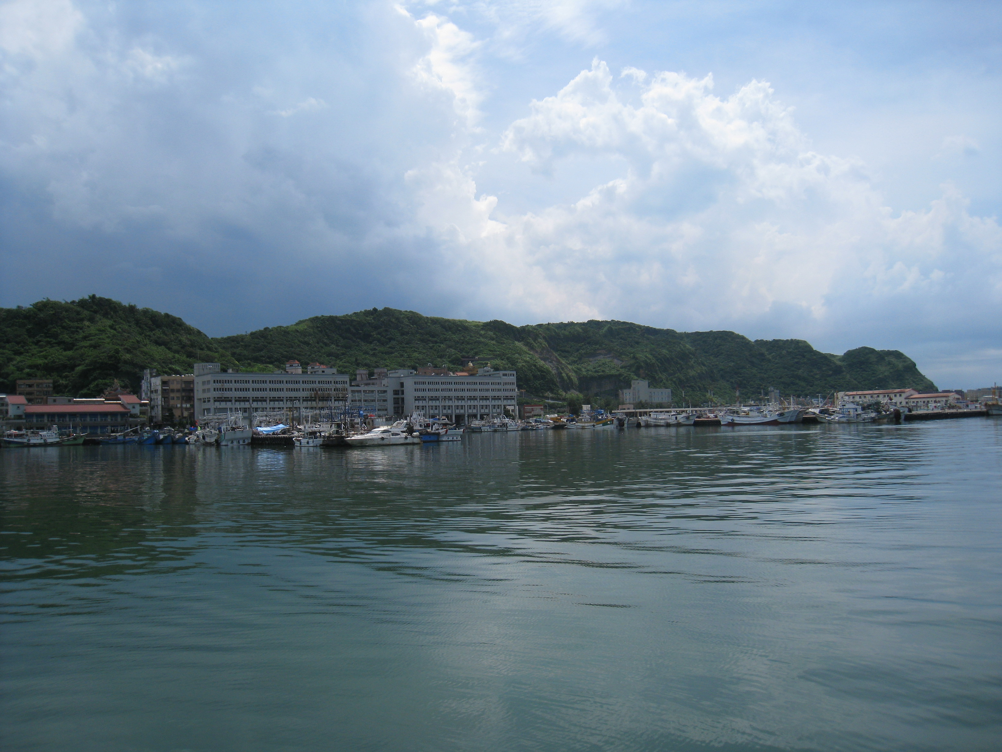 自海上觀看八斗子漁港。